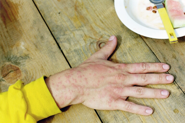 Stechmückenstiche, entstanden innerhalb von rund 10 Minuten, entstanden bei Orongoi, südlich Ulan-Ude. Russland